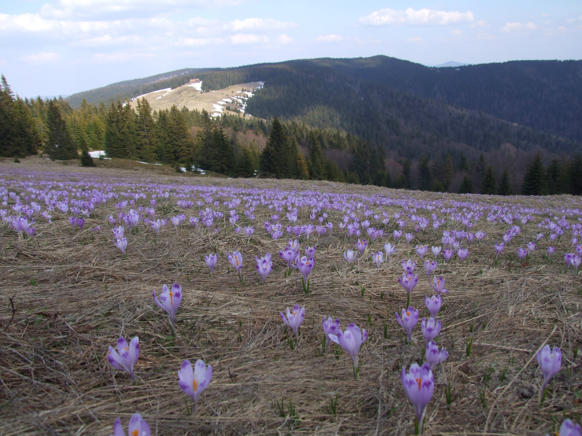 Crocus vernus (syn. C. scepusiensis), Turbacz, na pierwszym planie krokusy na Polanie Wolnica, w tle Hala Długa, Gorczanski National Park, Poland.